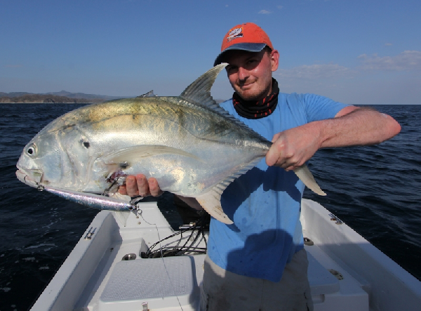 Poisson capturé lors d'un voyage au Costa-Rica en 2014 (Samara, Guanacaste)